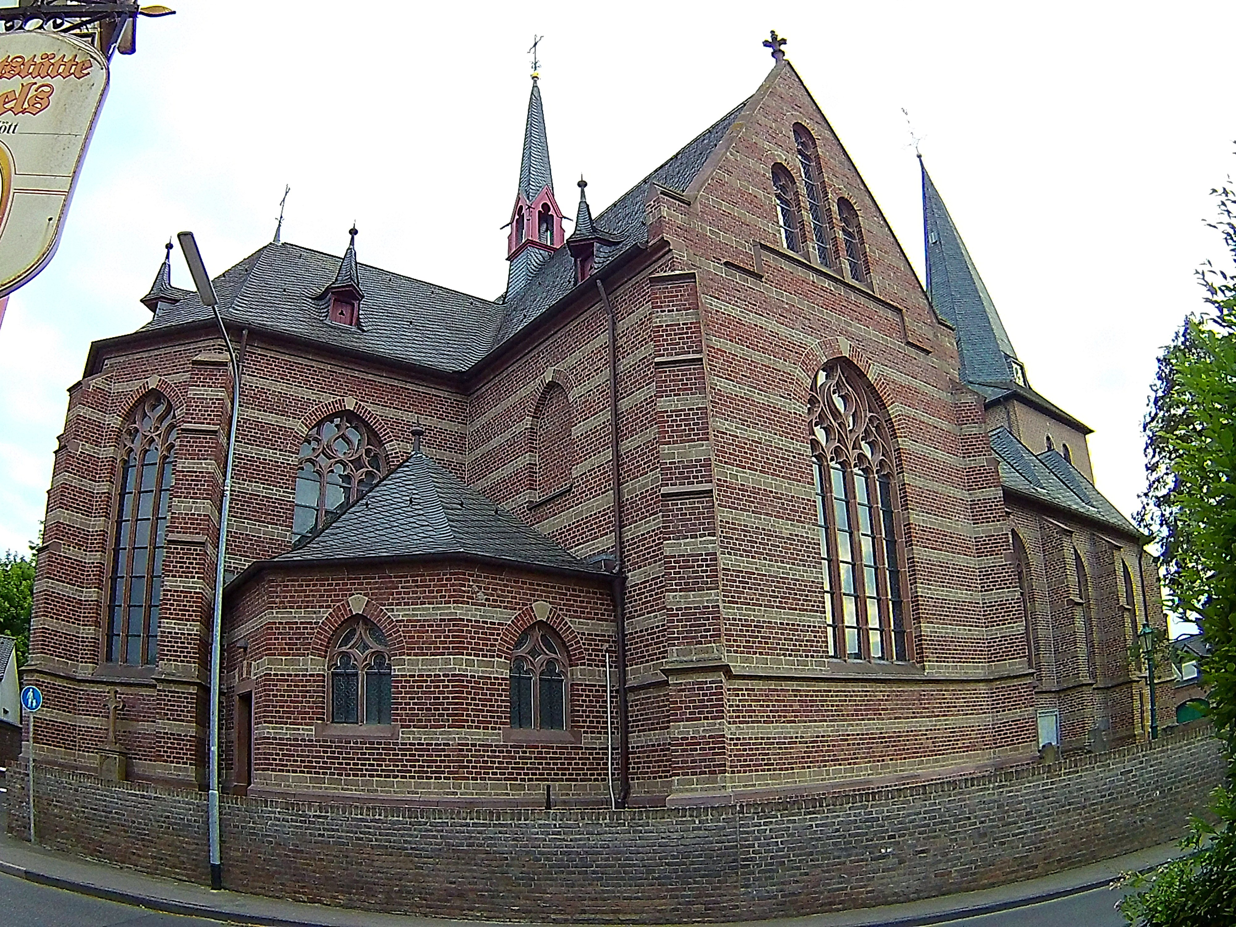 Katholische Kirche St. Michael Aussen (Nordwestseite)